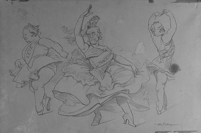 Otho Cushing, caricature, Le Théâtre républicain (1912). The Metropolitan Museum (acquis en 1942), Fletcher Fund.